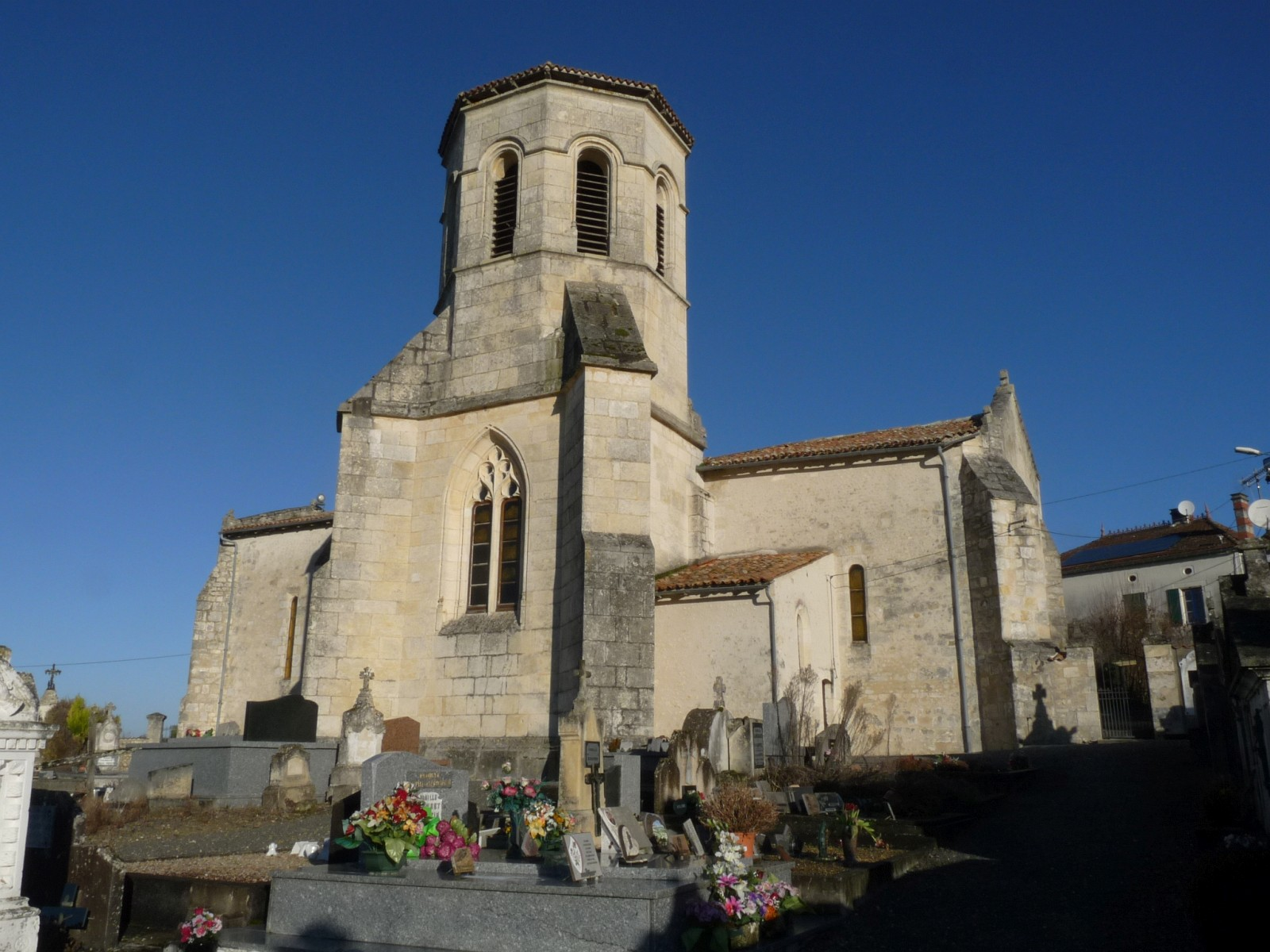 Eglise de Sousmoulins, Charente-Maritime, France